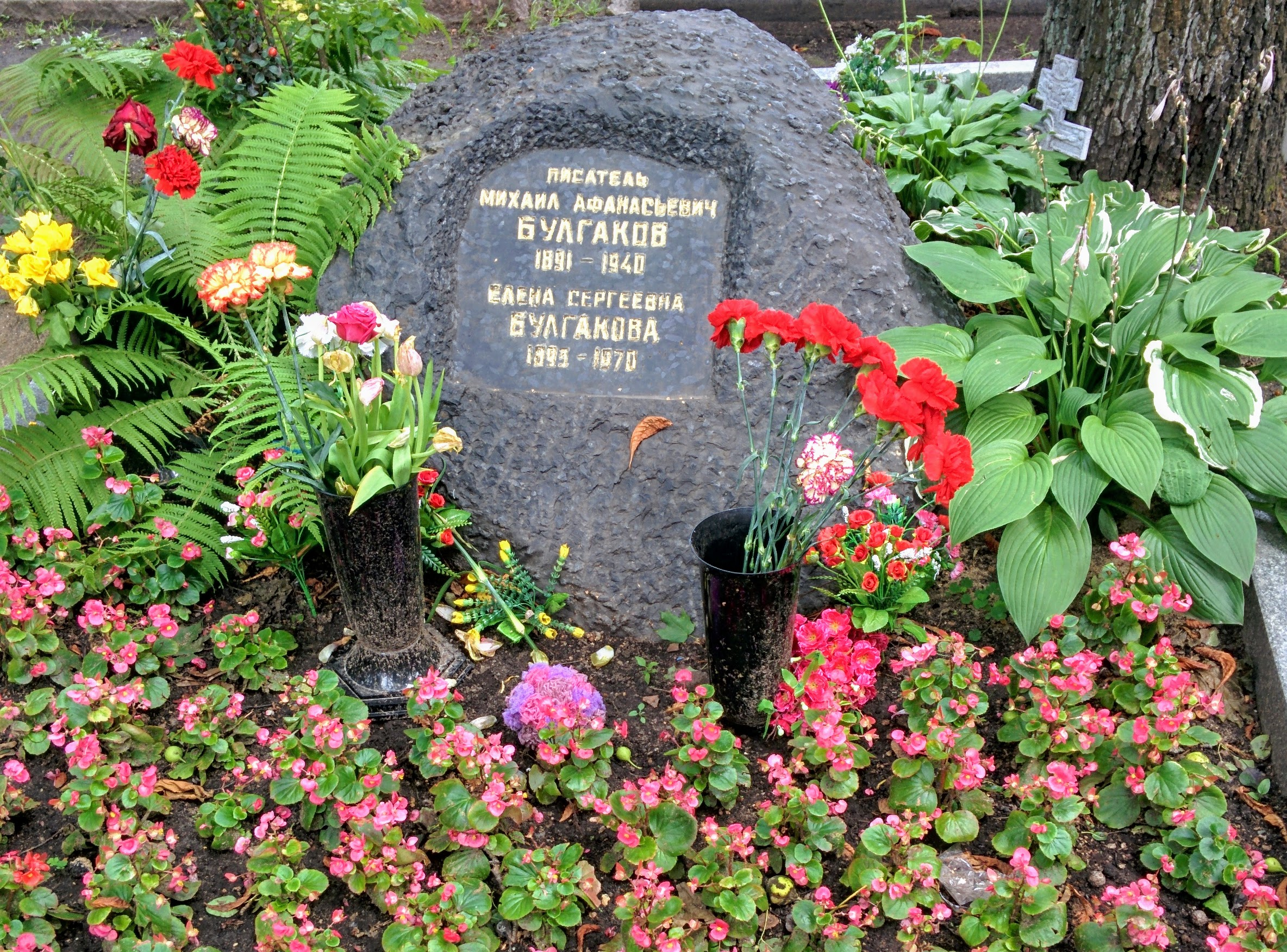 Grave of Mikhail Boulgakov and its 3rd wife in Novodievichi cimetary